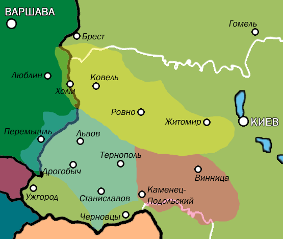 Карта структурных единиц УПА, составленная на основе книги М. Лебидя "Украинская повстанческая армия"